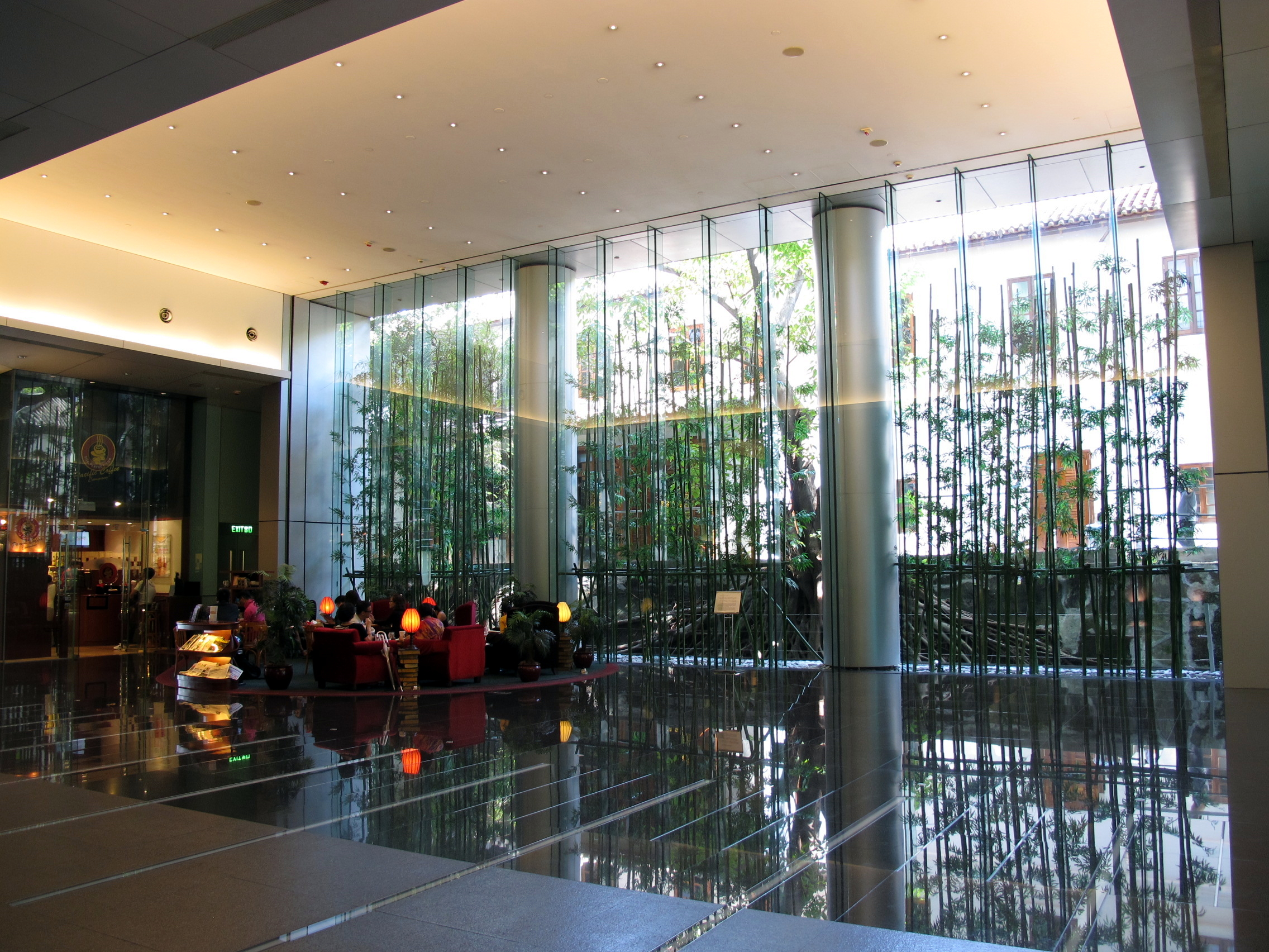 One Peking Lobby